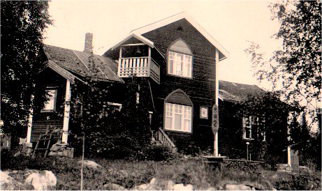 Suomalaisen kirjailijan Ilmari Kiannon (1874–1970) kotipaikka Turjanlinna.